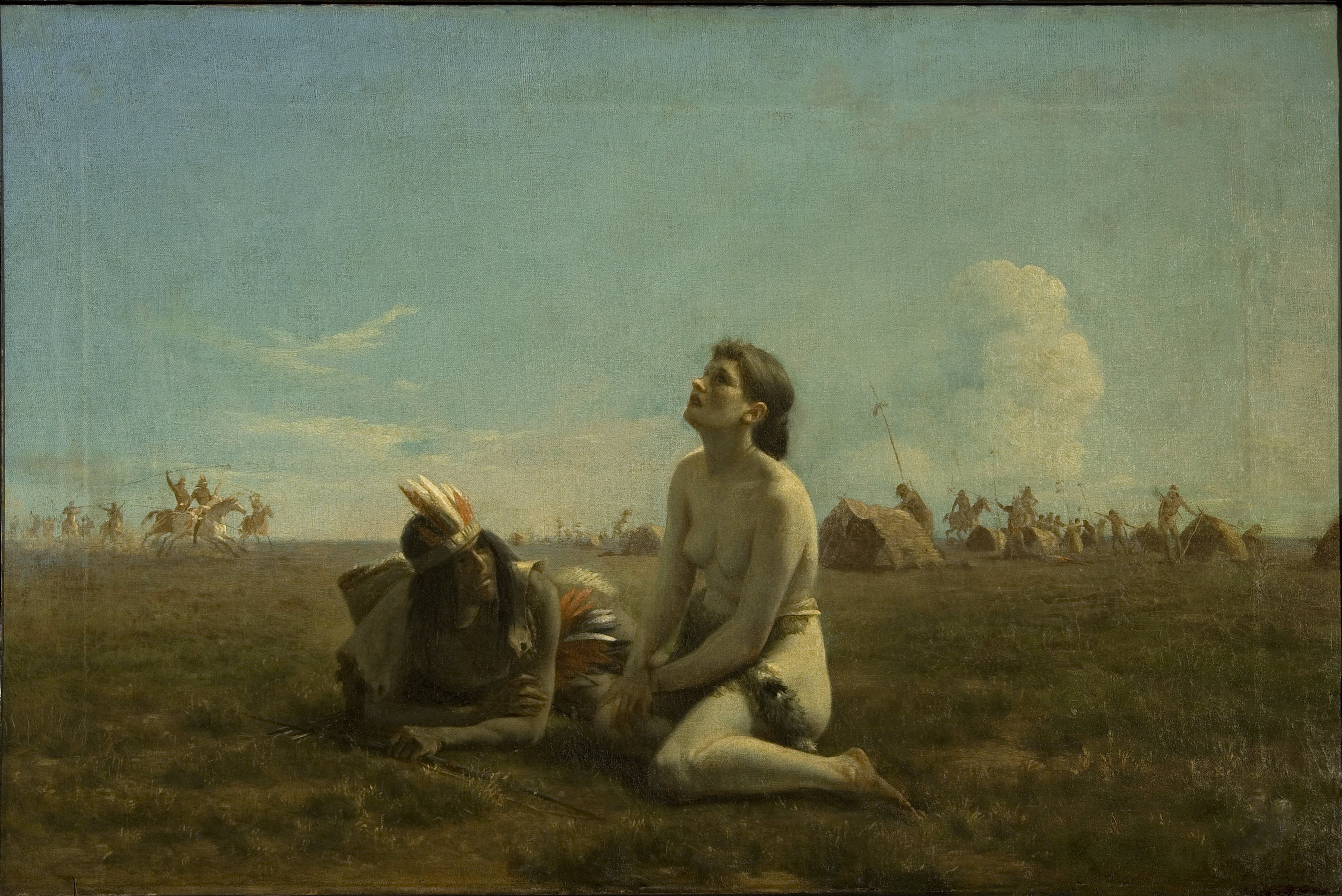 Obra "La cautiva" del pintor uruguayo Juan Manuel Blanes. Óleo sobre tela. Ubicado en la Colección de Arte Amalia Lacroze de Fortabat (Buenos Aires, Argentina)